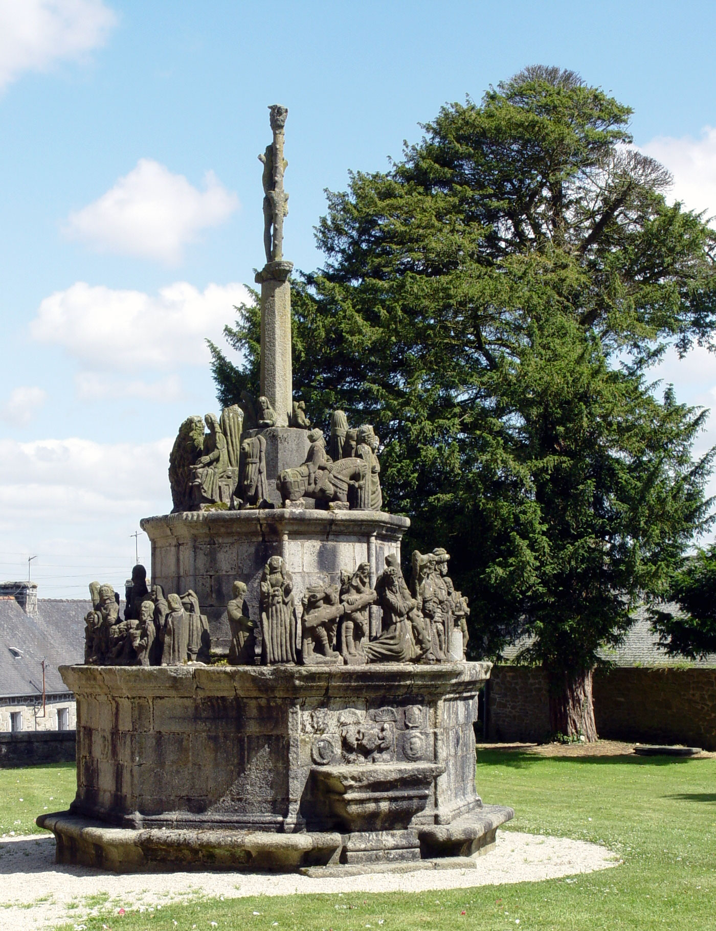 Calvaire in Kergrist-Moelou (Bretagne, Cotes d'Armor)